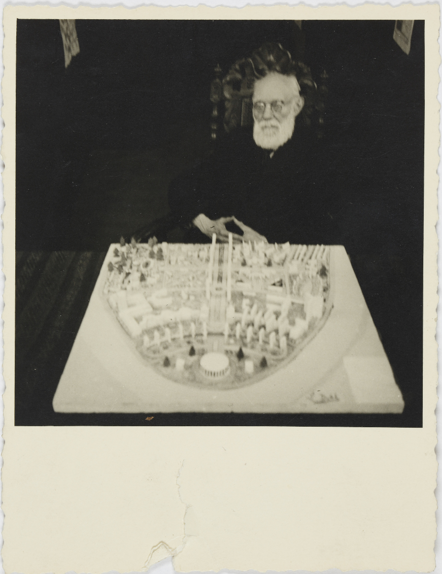 Paul Otlet assis devant la maquette de la Cité mondiale - 1943